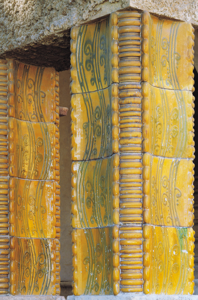 Reforma i ampliació